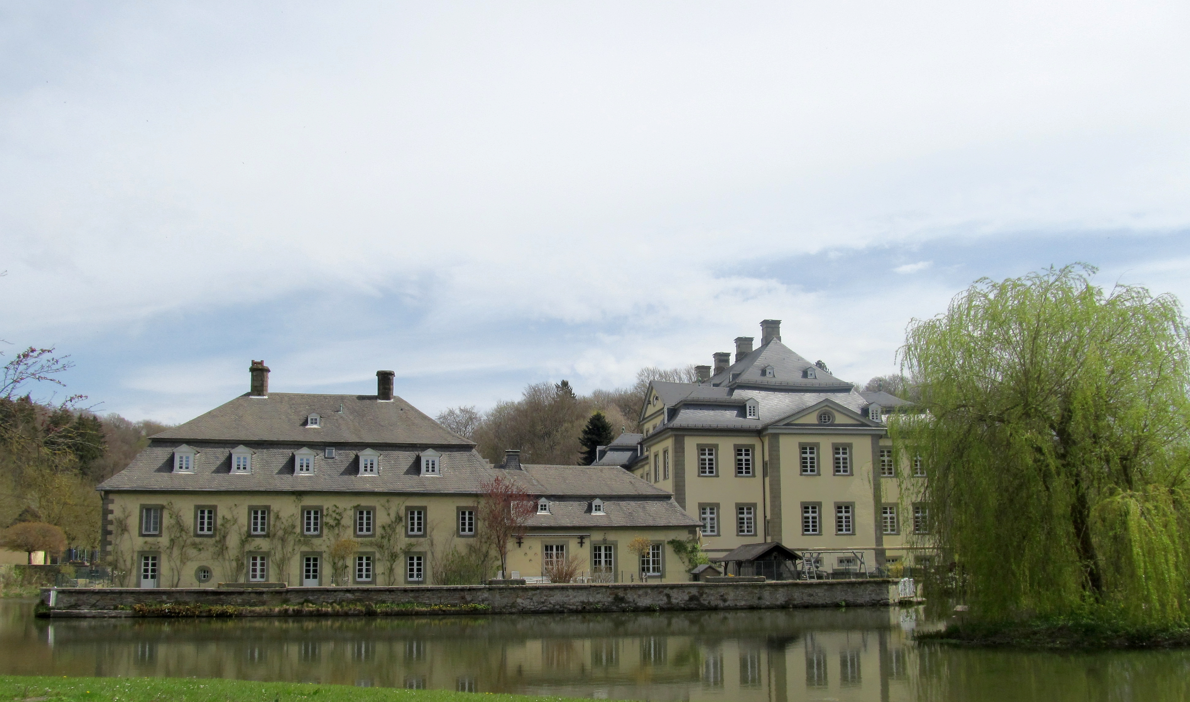 Schloss Körtlinghausen, Rüthen (Germany)